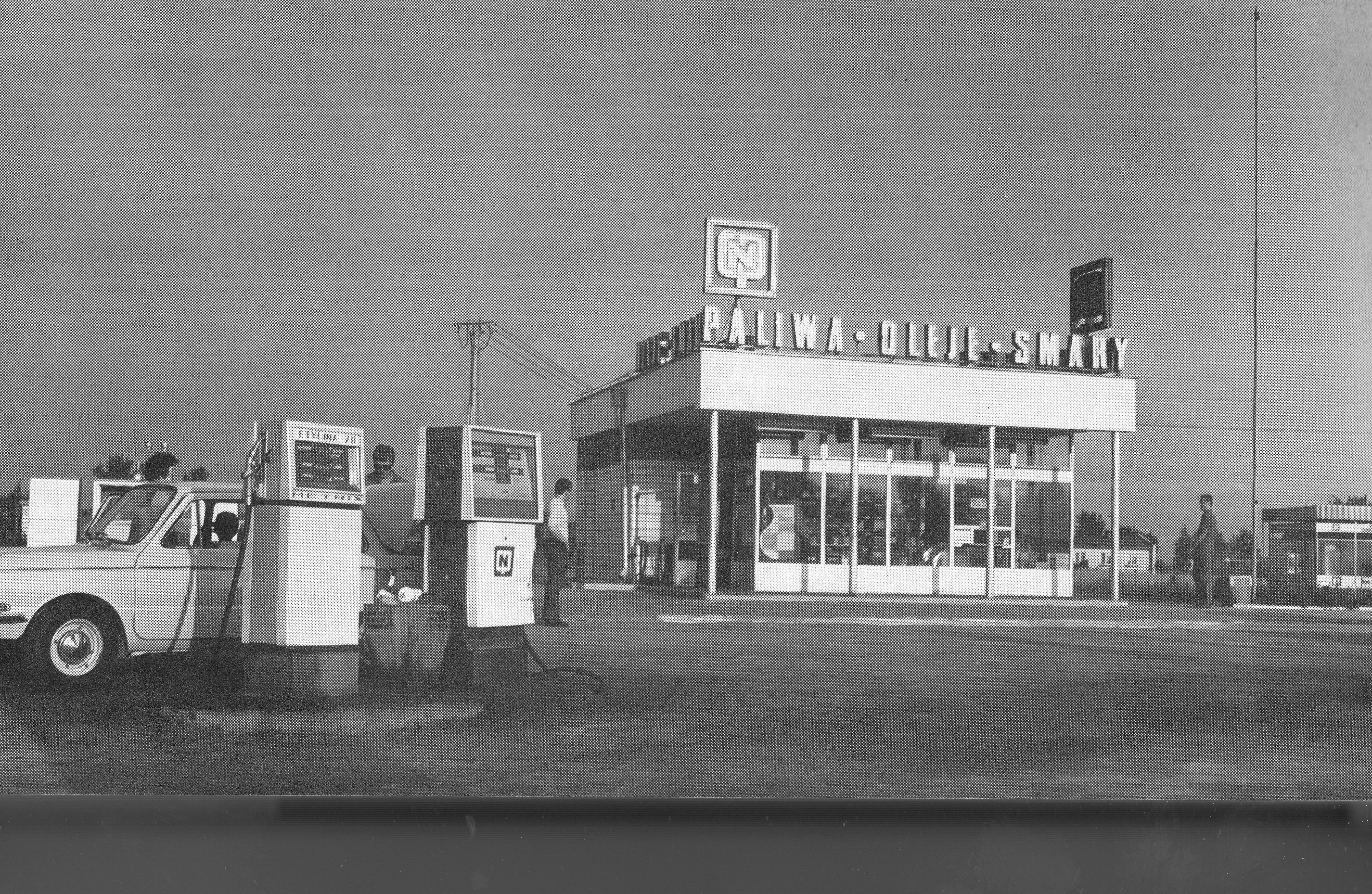 Stacja benzynowa CPN w Modlinie